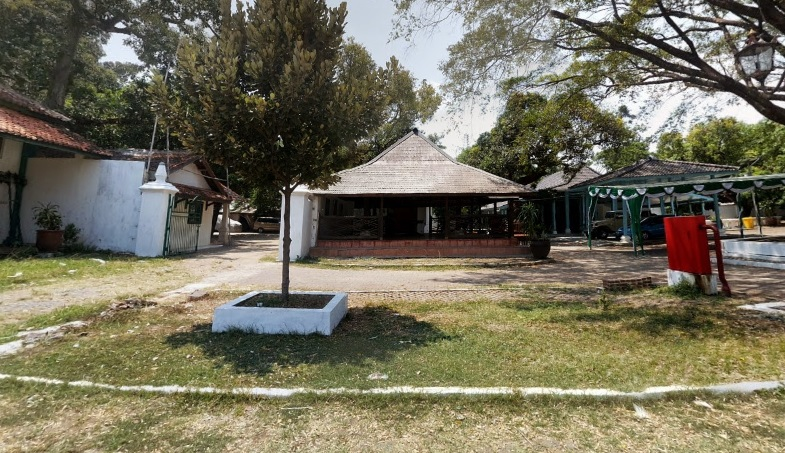 Paseban Singabrata_Kanoman